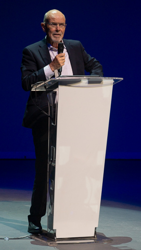 Philip Noel Pettit, politólogo y filósofo irlandés en Instituto Tecnológico y de Estudios Superiores de Monterrey, en el marco del Congreso Latinoamericano de Ciencias Políticas.